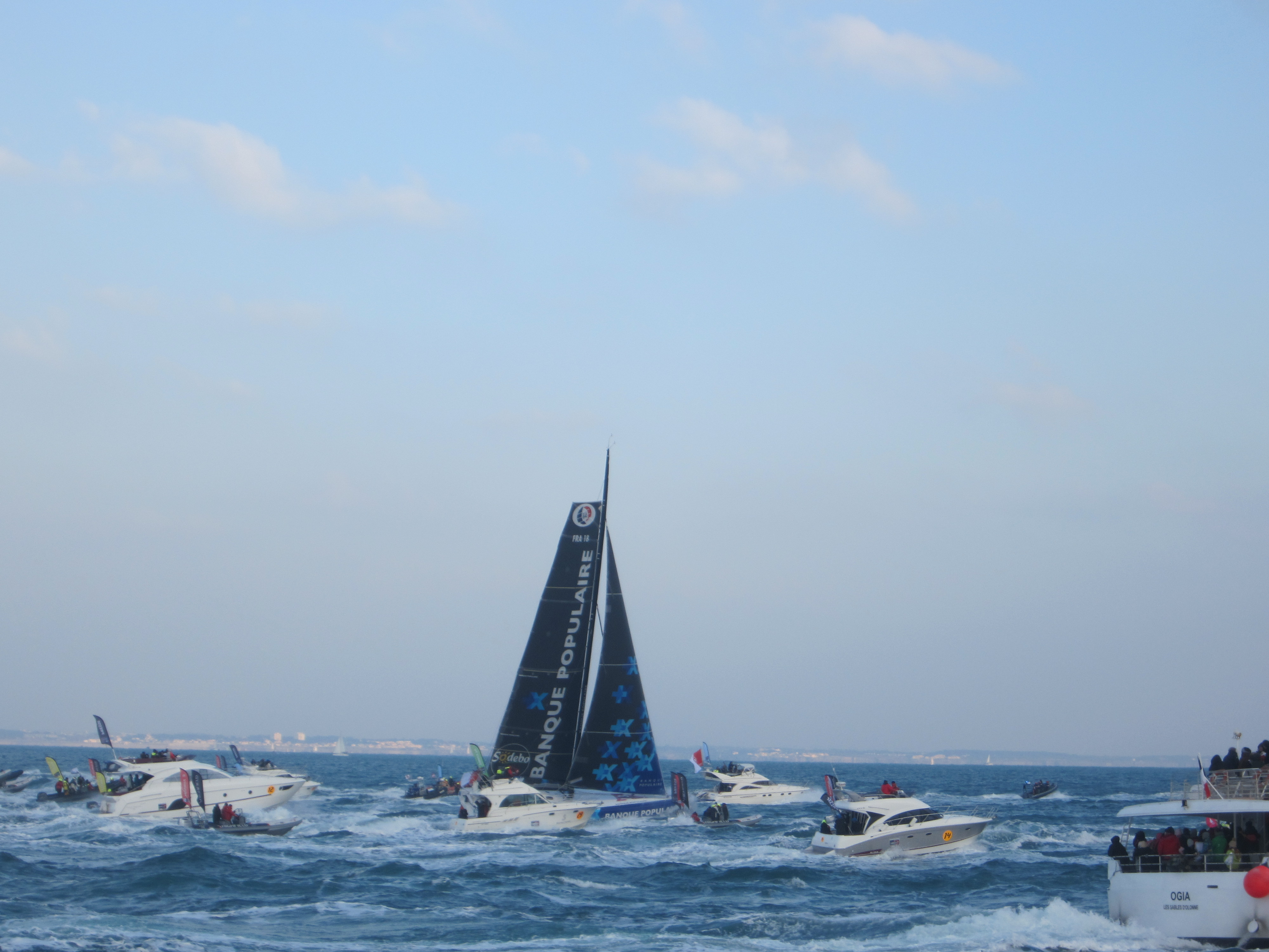 Banque Populaire VIII sous un ris et J2, les Sables d'Olonne en fond.